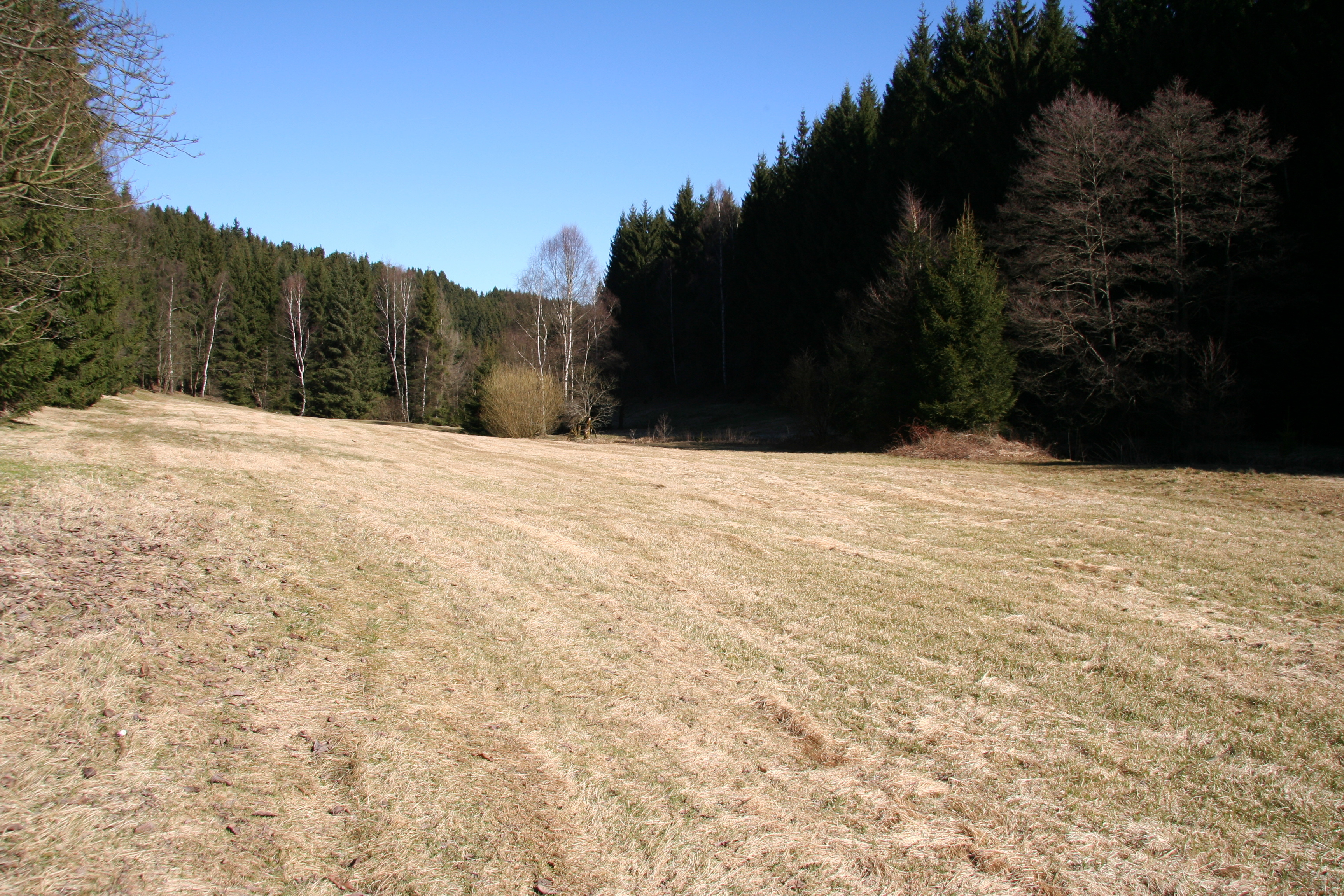 im Naturschutzgebiet "Rauschenbachtal", östlich von Annaberg-Buchholz